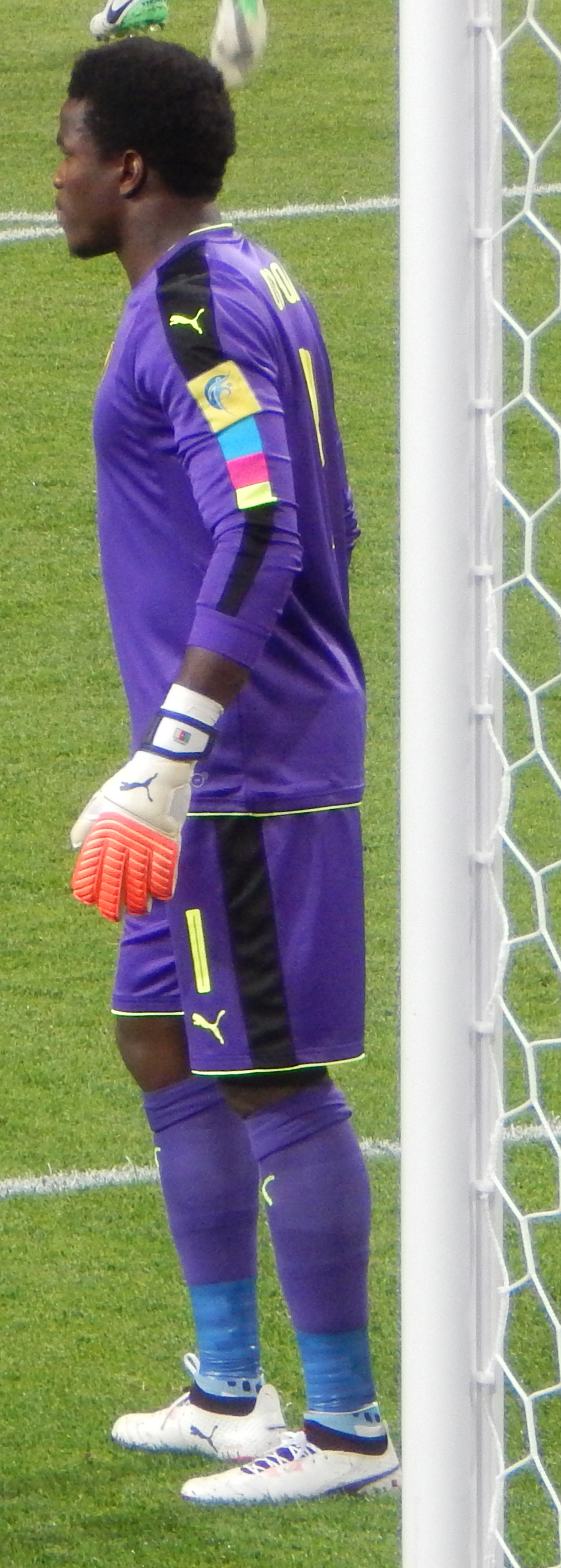 Фабрис Ондоа во время матча против сборной Чили